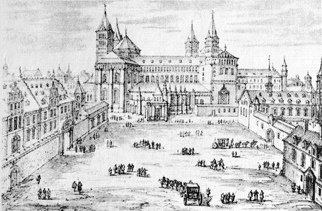 Dom von Speyer von Richtung Norden gesehen, links der damalige Bischofpalast, Federzeichnung vermutlich von Israël Silvestre